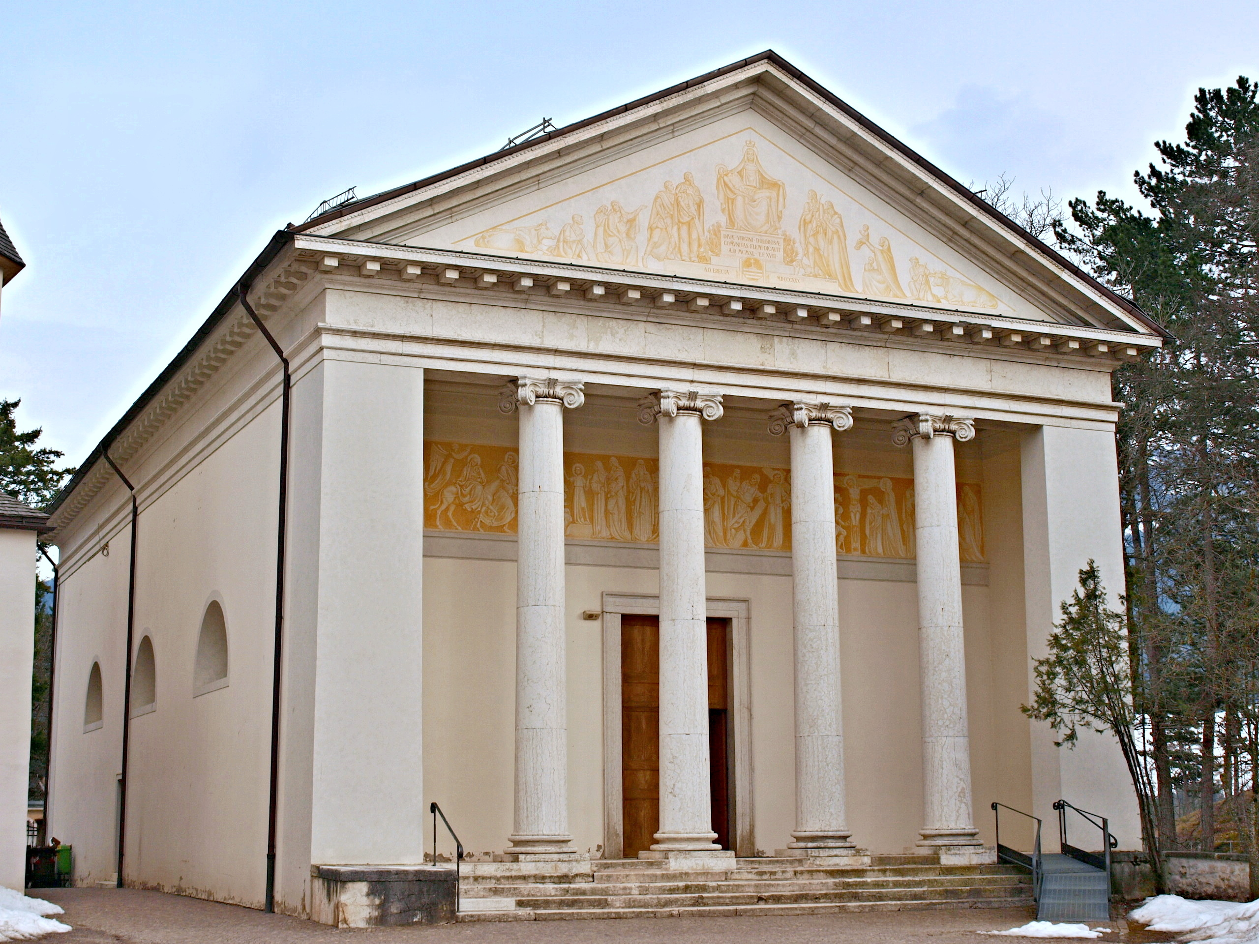 Cavalese